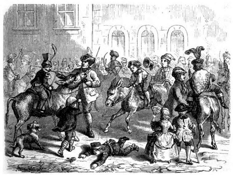 Eselsreiten in Köln